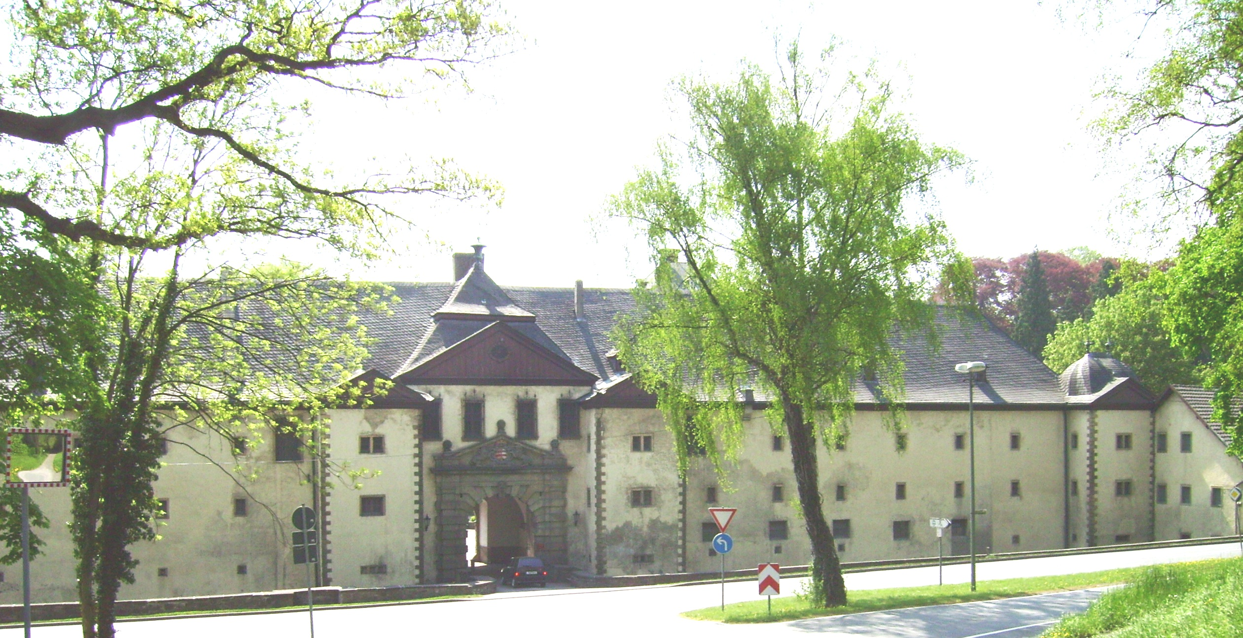 Tor zum Schloss Herdringen, Arnsberg